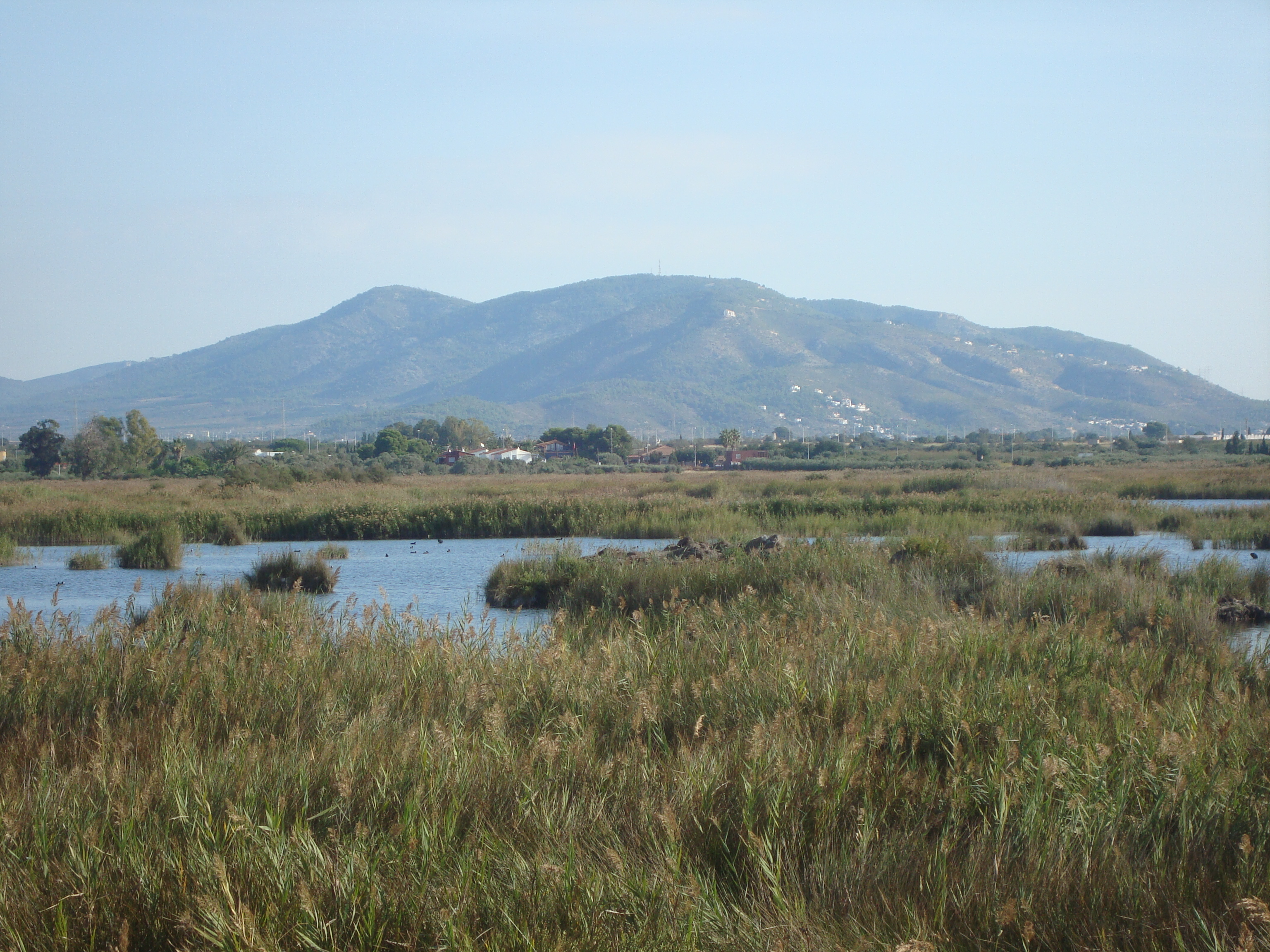 Paraje Natural del Prat de Cabanes-Torreblanca (Castellón, Comunidad Valenciana, España). Vista panorámica .